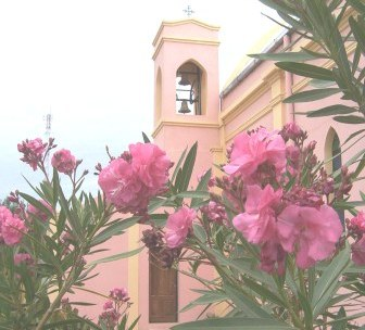 Capilla Santa Margarita